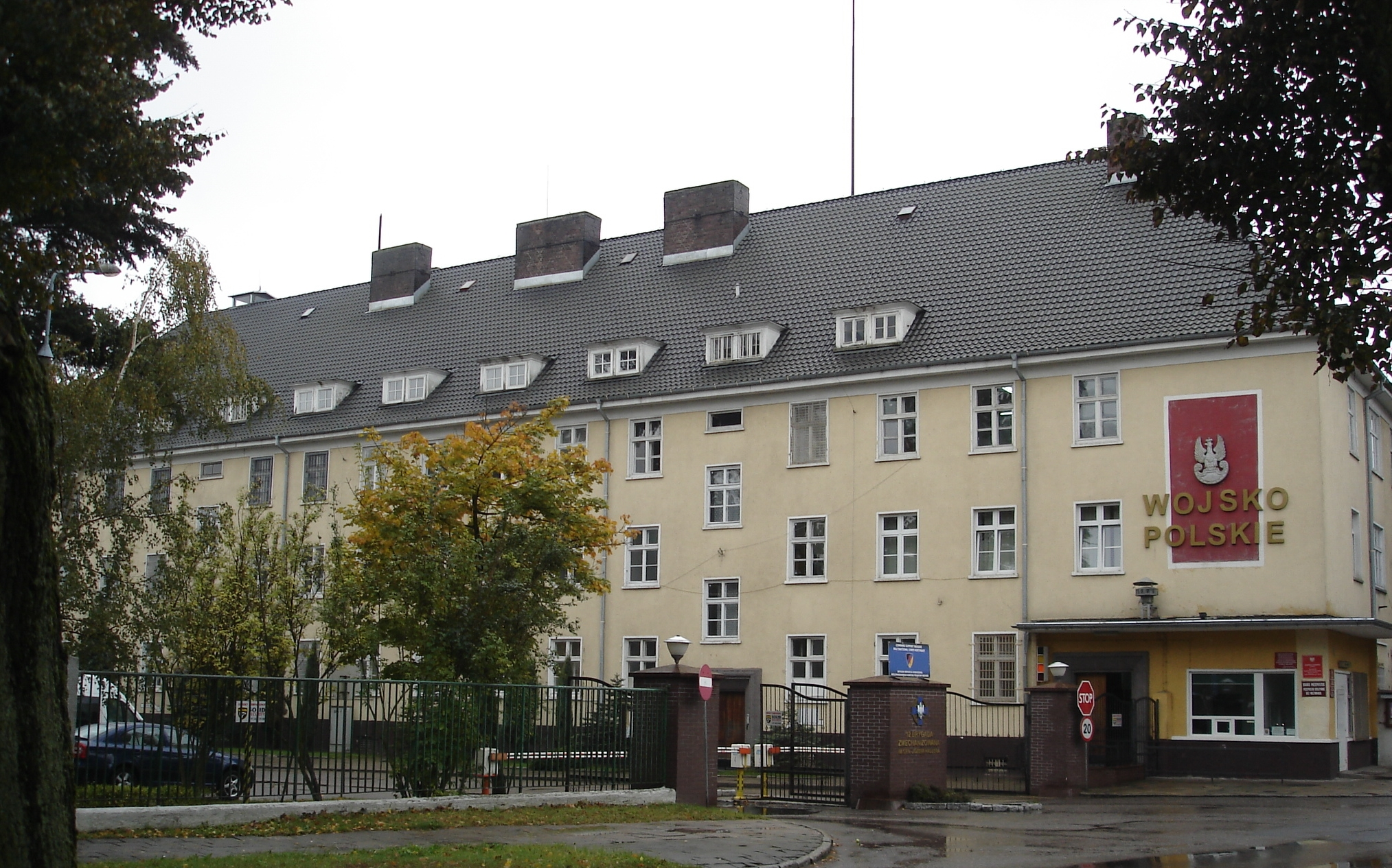 12 BZ w Stargardzie Szczecinskim